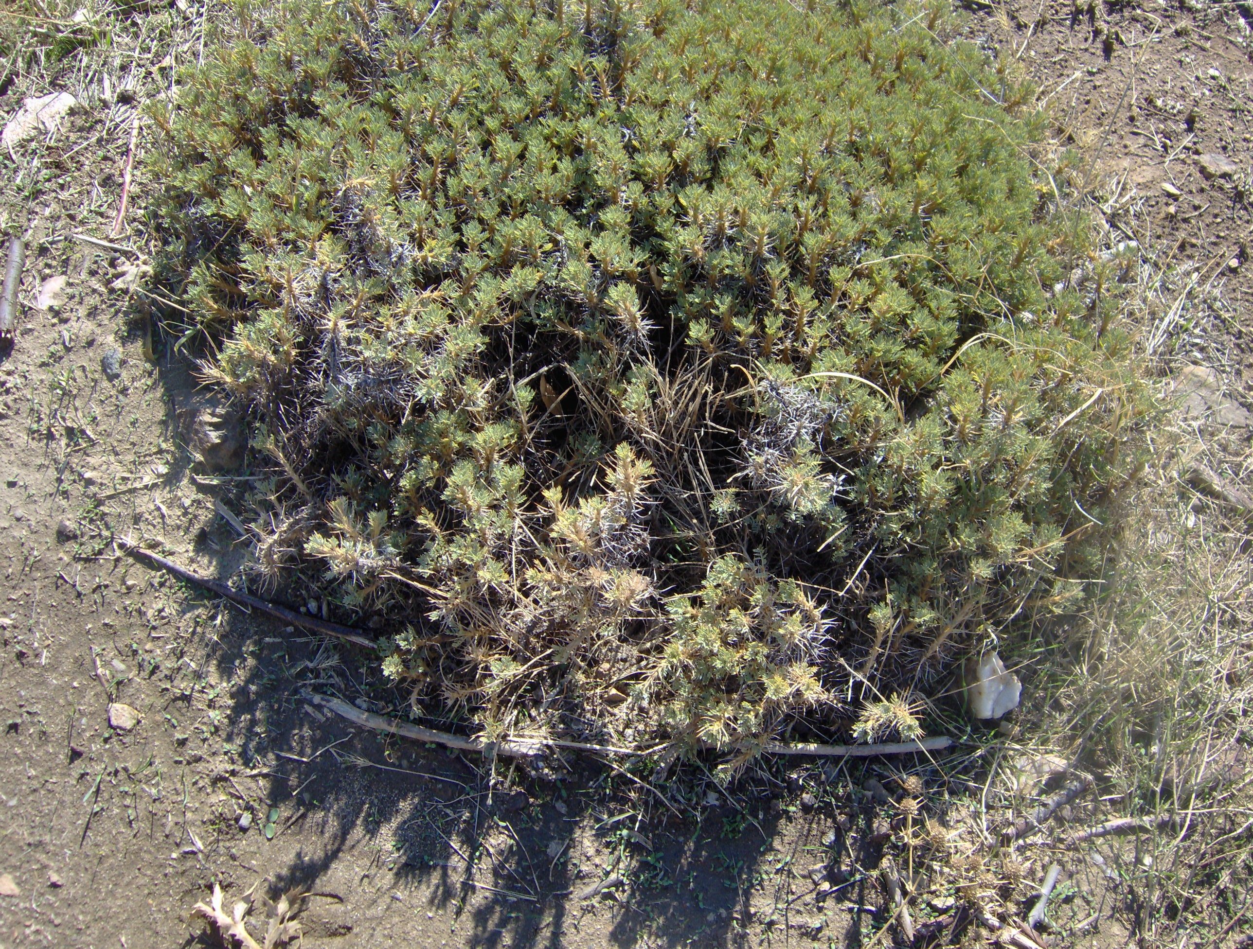 Yağmurlu, Kırşehir